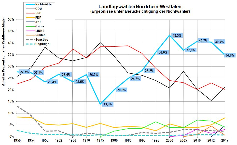 Historie des Anteils der Nichtwähler bei den Landtagswahlen in Nordrhein-Westfalen